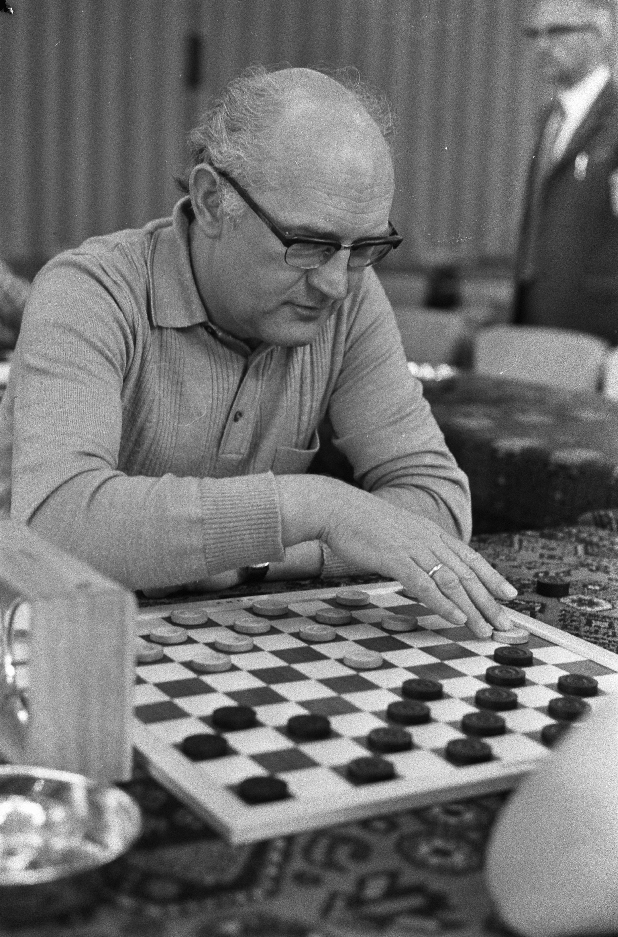 Collectie / Archief : Fotocollectie Anefo Reportage / Serie : [ onbekend ] Beschrijving : Damkampioenschap 1974 in Apeldoorn, nr. 8, 9 P. Bergsma Datum : 11 april 1974 Locatie : Apeldoorn, Gelderland Trefwoorden : KAMPIOENSCHAPPEN, dammen Persoonsnaam : P. Bergsma Fotograaf : Punt, […] / Anefo Auteursrechthebbende : Nationaal Archief Materiaalsoort : Negatief (zwart/wit) Nummer archiefinventaris : bekijk toegang 2.24.01.05 Bestanddeelnummer : 927-1234